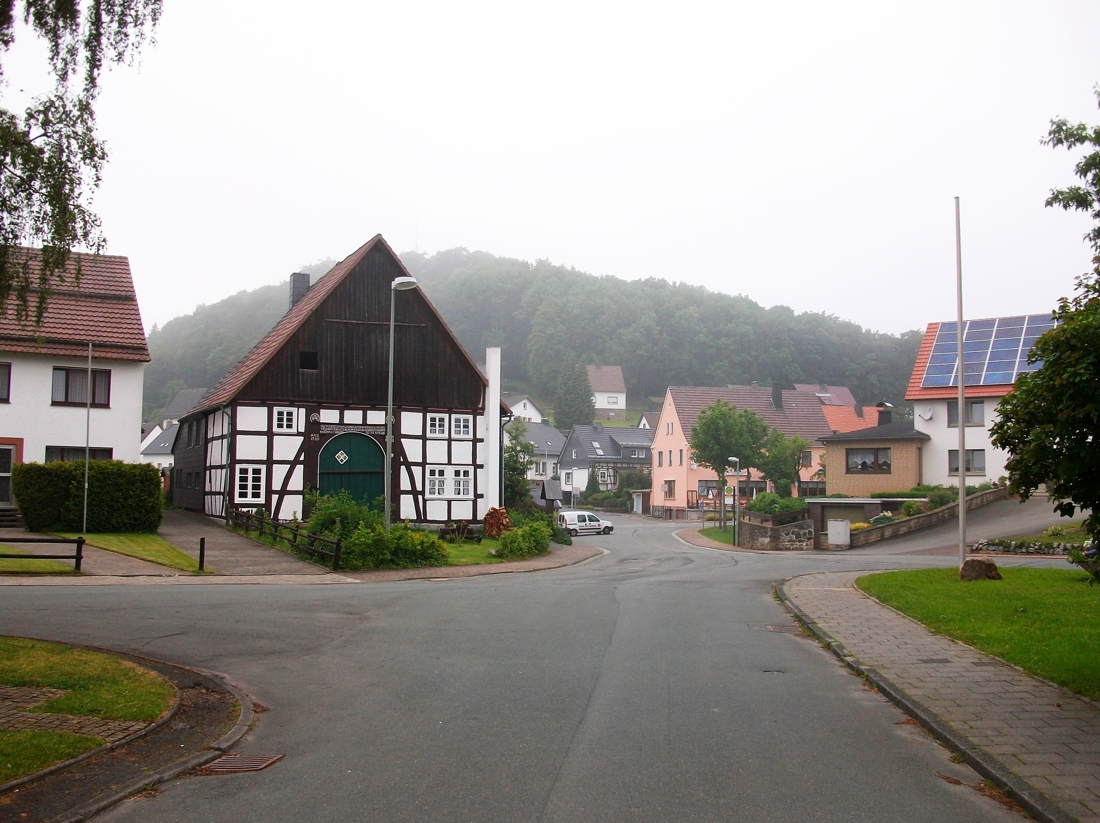 Marsberg-Padberg, mit denkmalgeschütztem Fachwerkhaus (Germany)